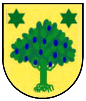 Wappen von Pflummern in der Stadt Riedlingen, Baden-Württemberg